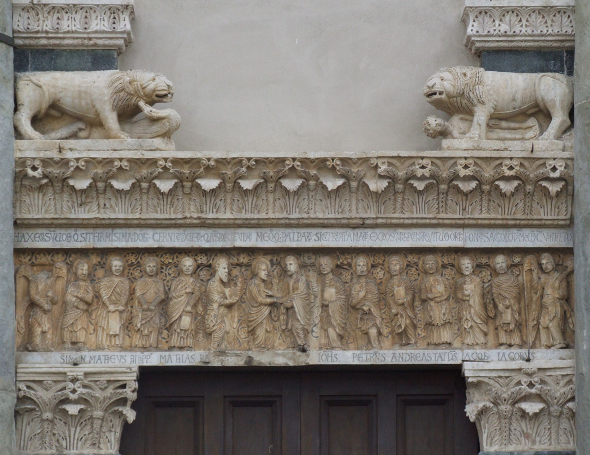 Chiesa Bartolomeo in Pantano, Pistoia, Italy